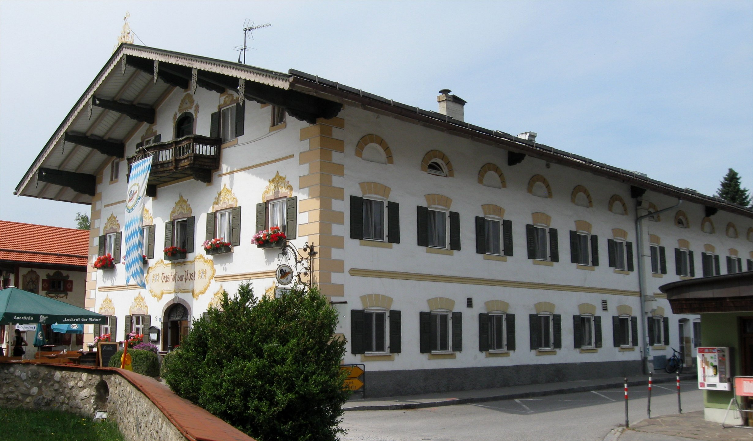 Dorfplatz 4; Gasthaus zur Post, stattliche Einfirstanlage mit Balkon und Rotmarmorportal, 1825.